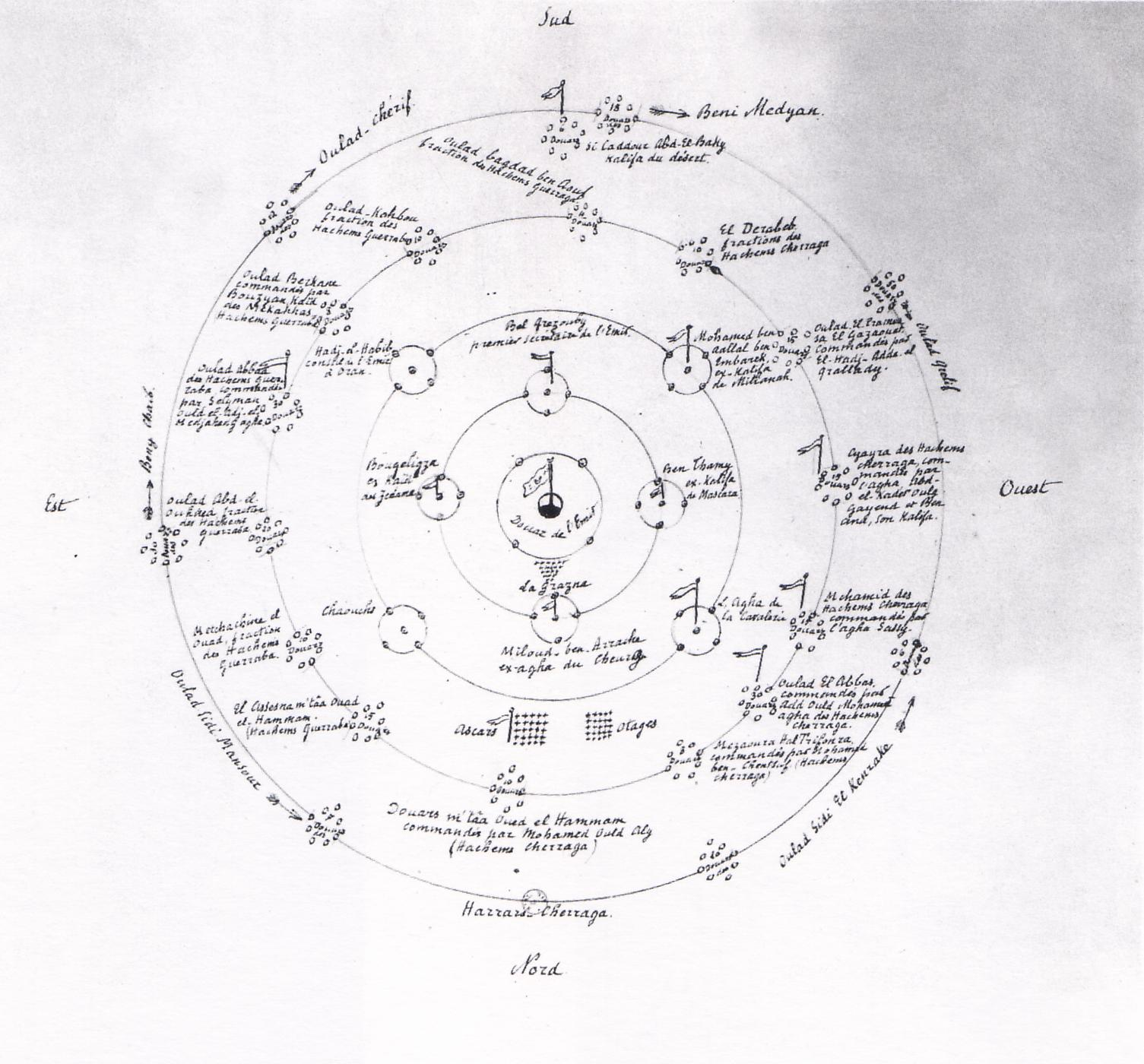 Composition de la smalah d'Abd el Kader, schéma d'après Daumas.